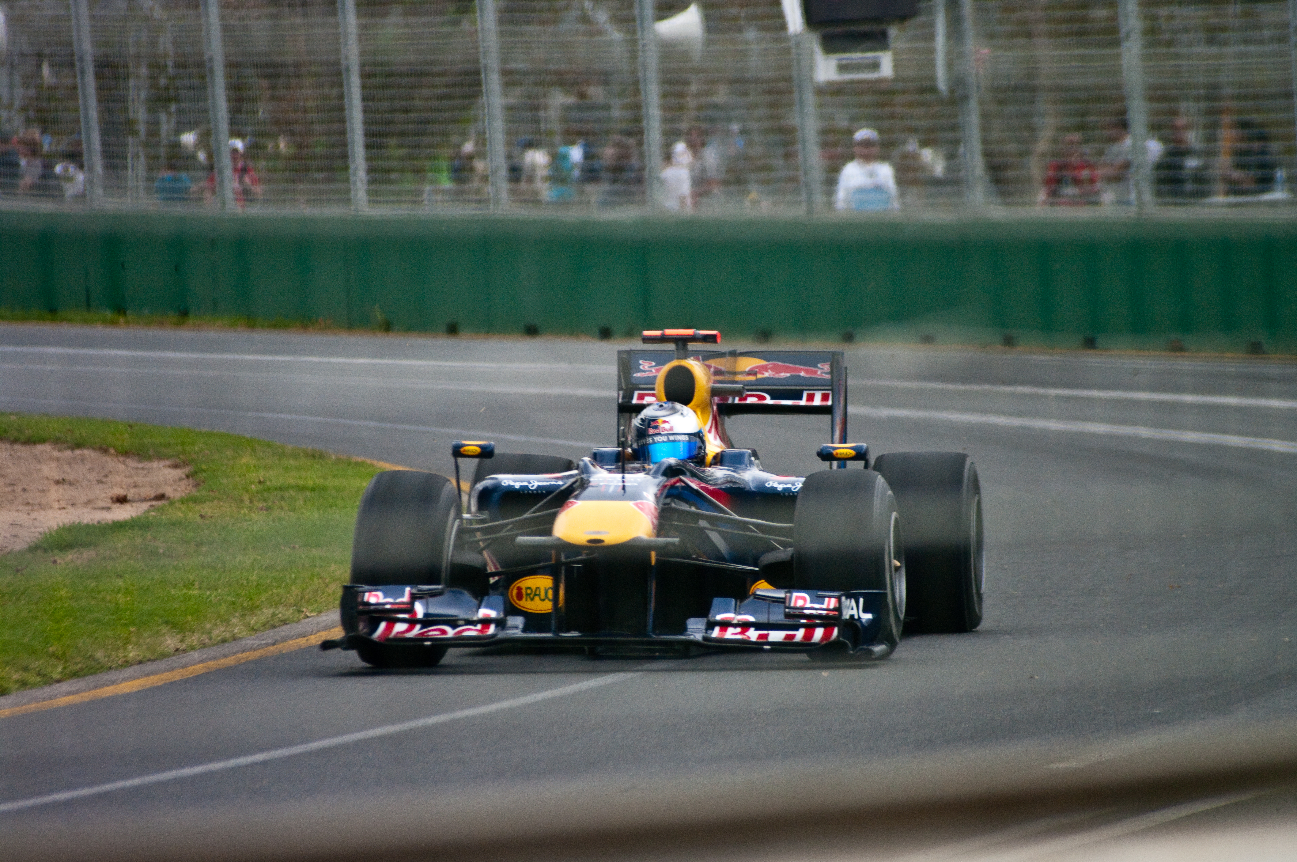 Vettel Melbourne 2010